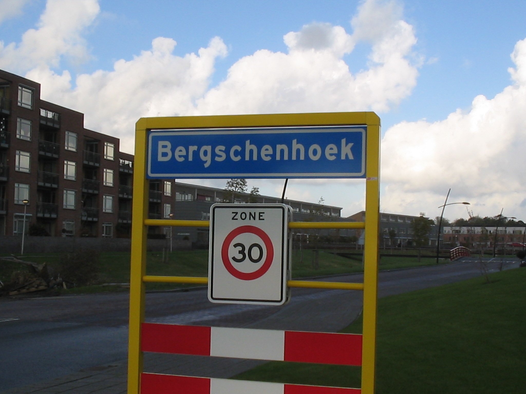 Bergschenhoek bord, 7 november 2005